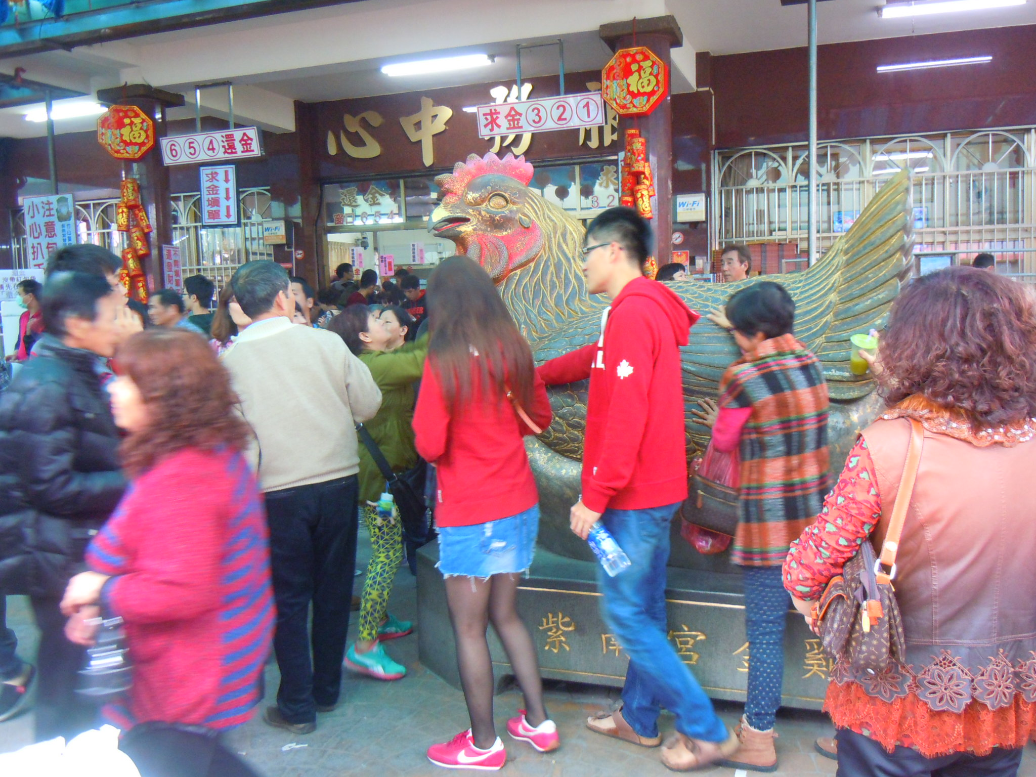 中文(繁體):竹山紫南宮的所在地:南投縣竹山鎮社寮里大公街。